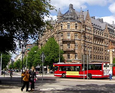 A Nybroplan, Stockholm